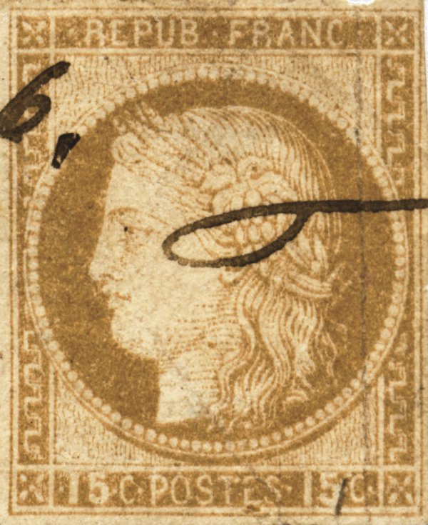 Timbre Cérès des Colonies françaises (1871)